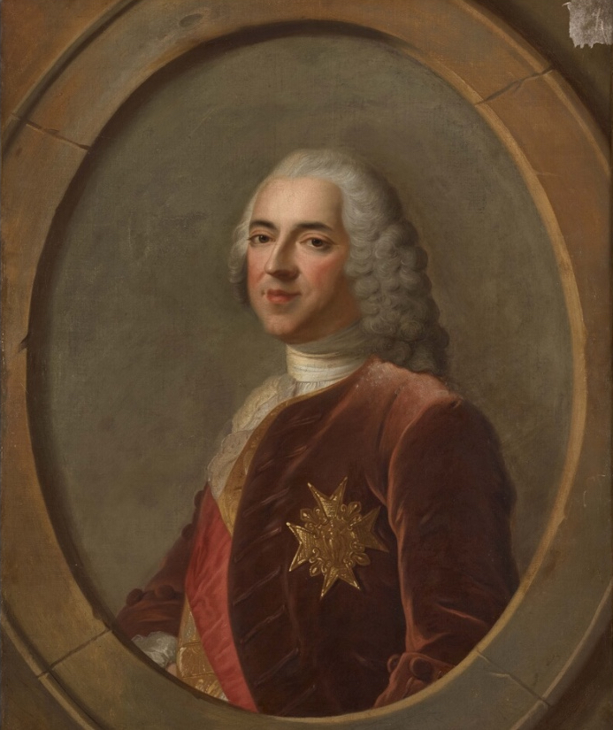 présenté au Musée de la Préfecture de Police (Paris).